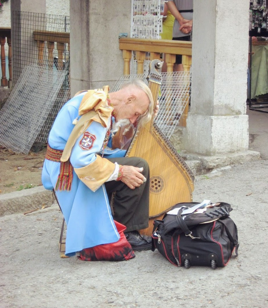 Ялтинський кобзар Кіндрачук Остап Юрійович